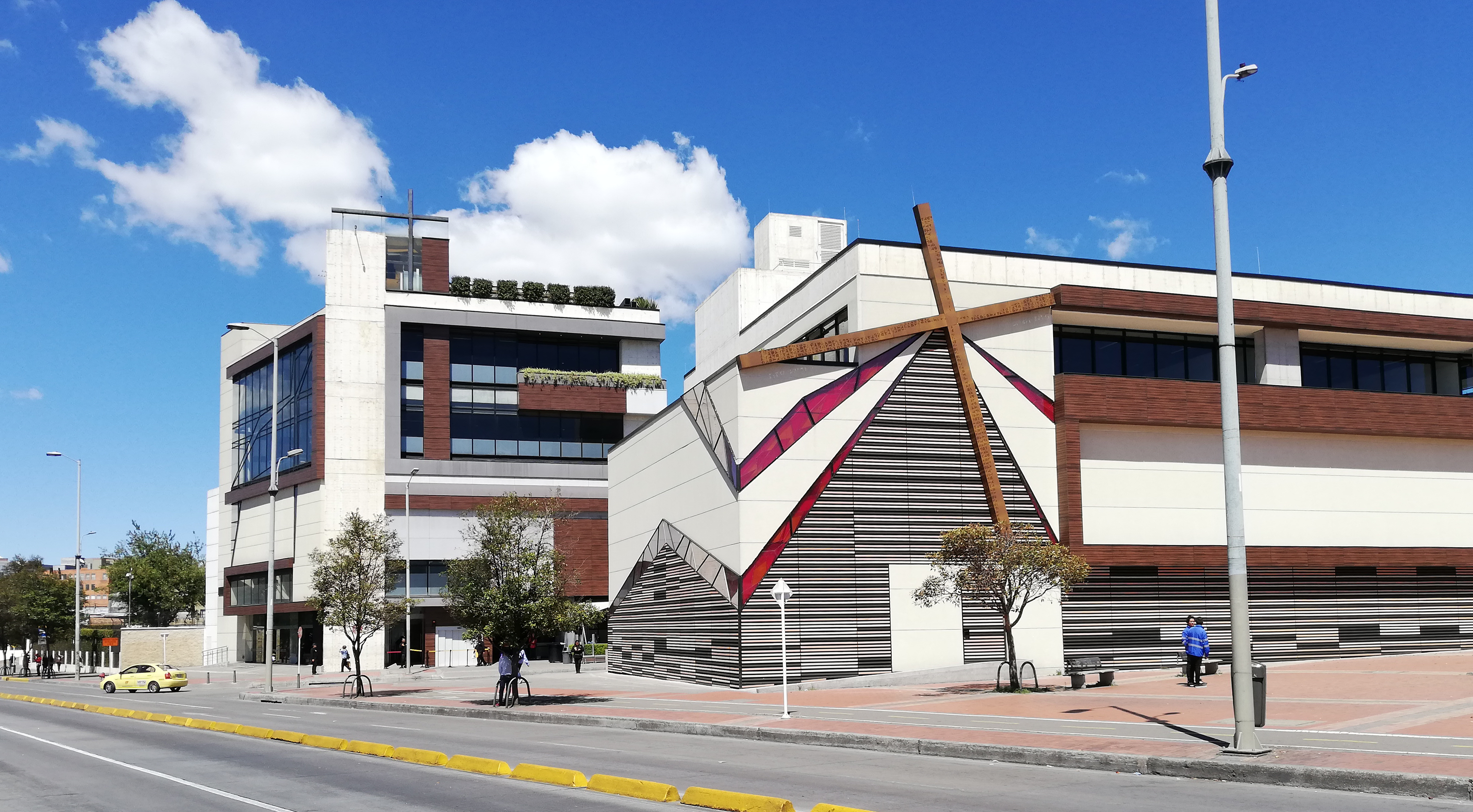 Exterior Auditorio Principal y El Teatro